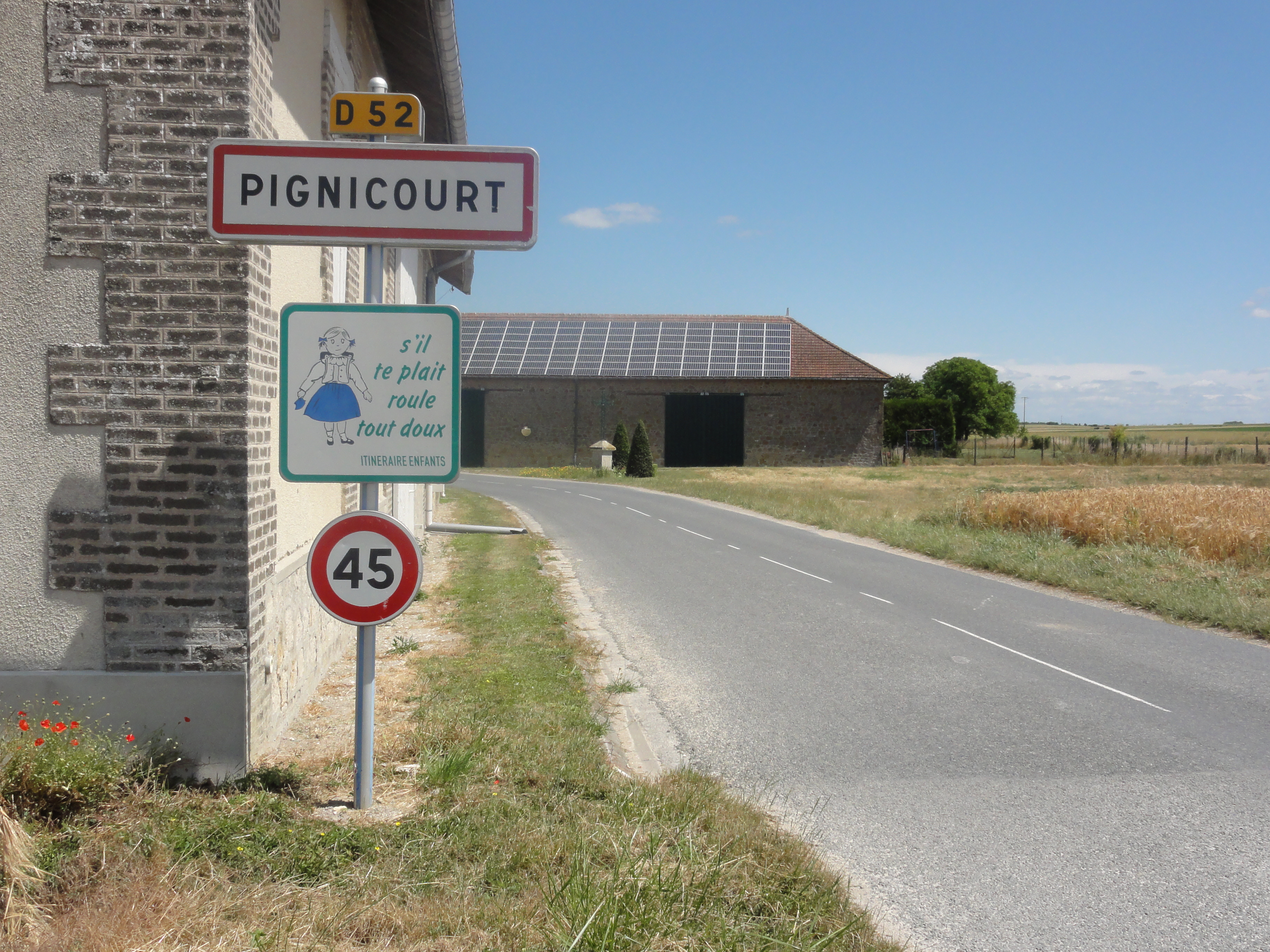 Pignicourt (Aisne) city limit sign